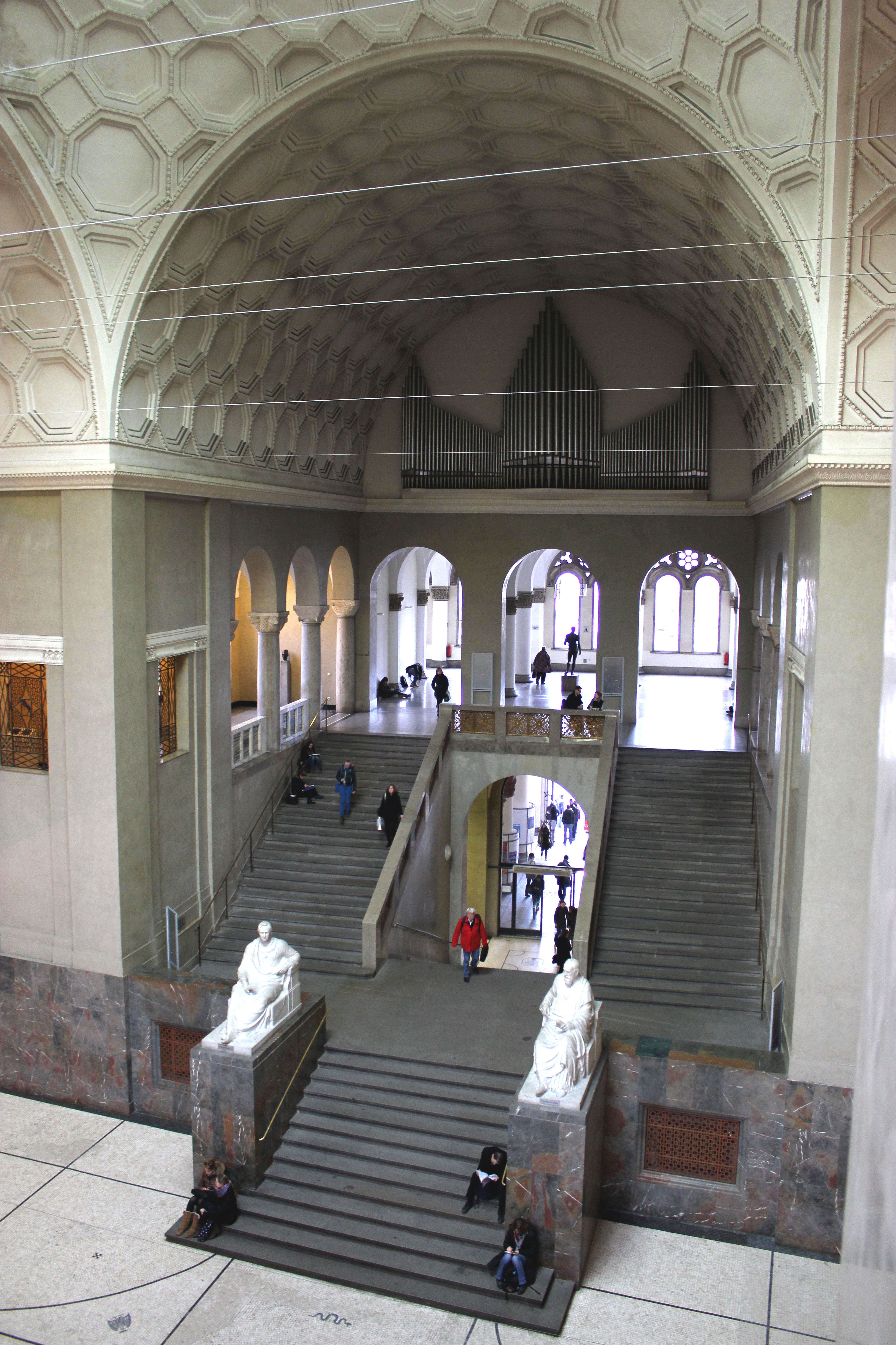 Lichthof der Ludwig-Maximilians-Universität München